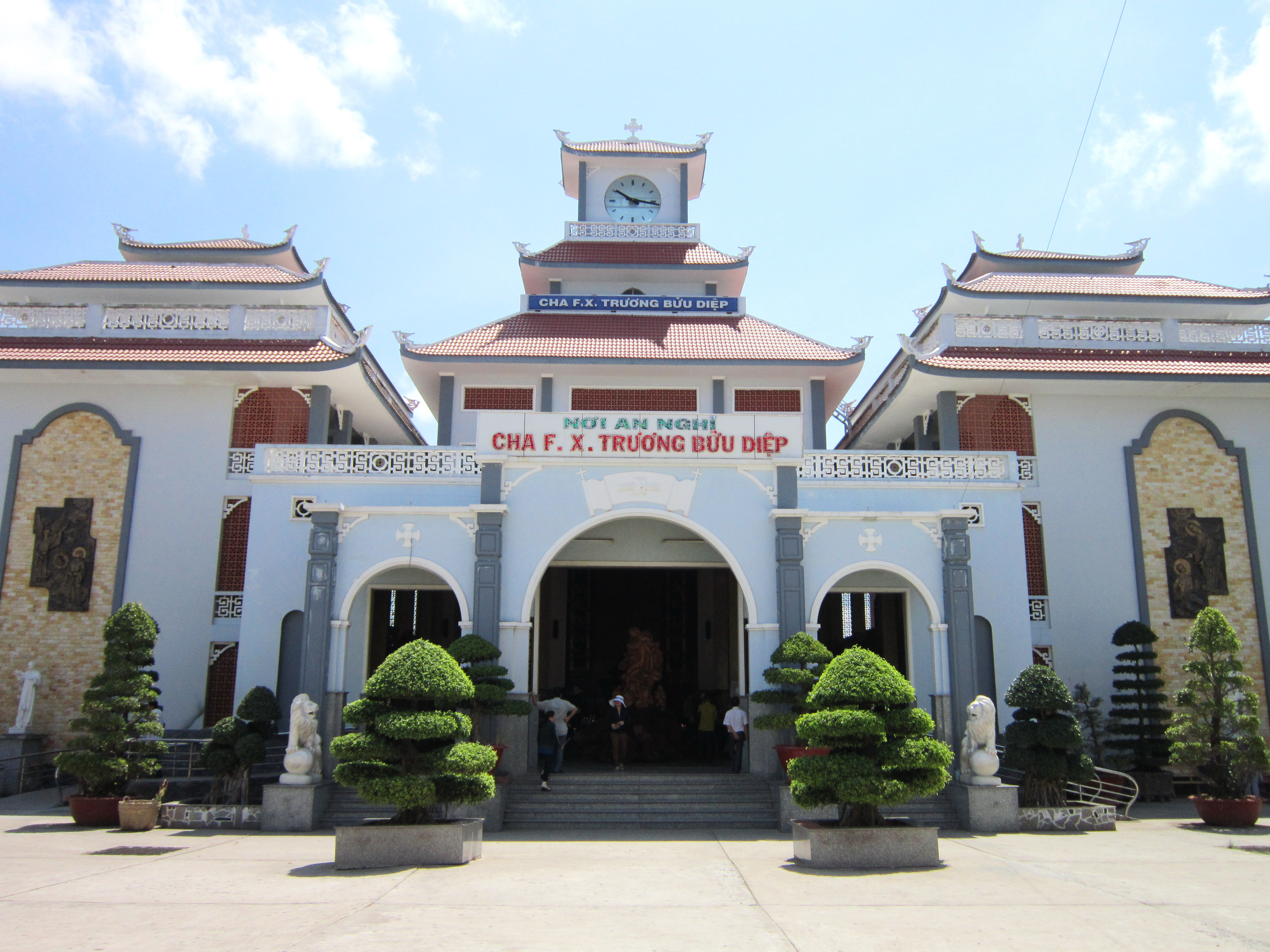 Nơi an nghỉ của LM Trương Bửu Diệp (1897 - 1946) trong nhà thờ Tắc Sậy ở xã Tân Phong, huyện Giá Rai, tỉnh Bạc Liêu, Việt Nam.